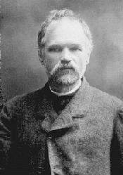 Andrzej Średniawski (1857 - 1931) rakouský politik polské národnosti z Haliče